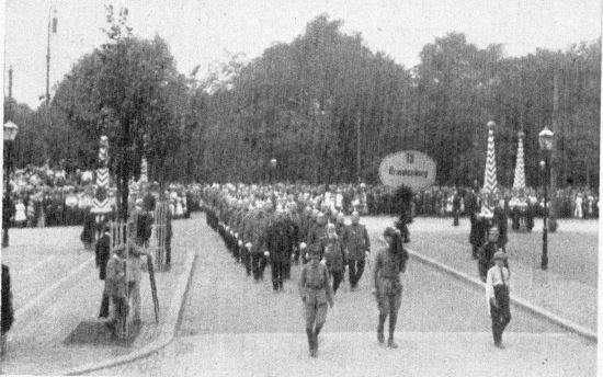 Die Teilnehmer des 1. Unterverbandes Niederbarnim in der Brandenburgischen Gruppe beim Huldigungsfestzuge am Feuerwehrtage (24. bis 29. Juli 1913) in Leipzig an dem Protektor, dem Könige von Sachsen vorbeimarschierend.